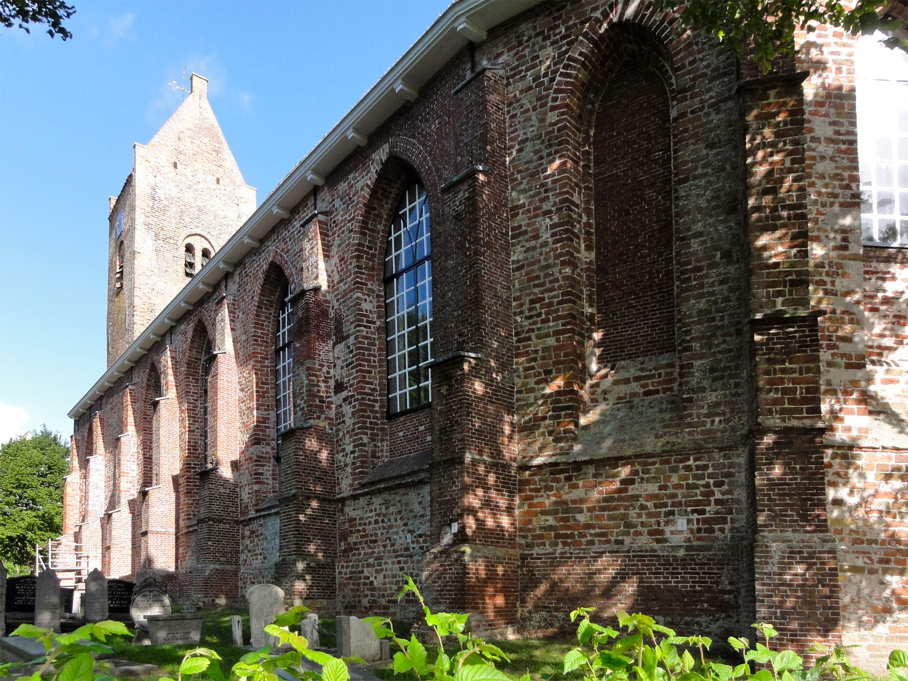 Sint-Nicolaaskerk van Blija